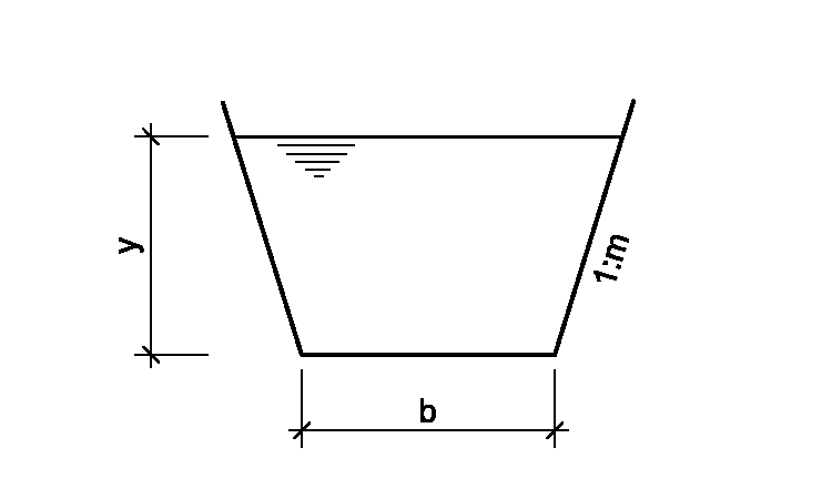 Jednoduché schéma lichoběžníkového koryta